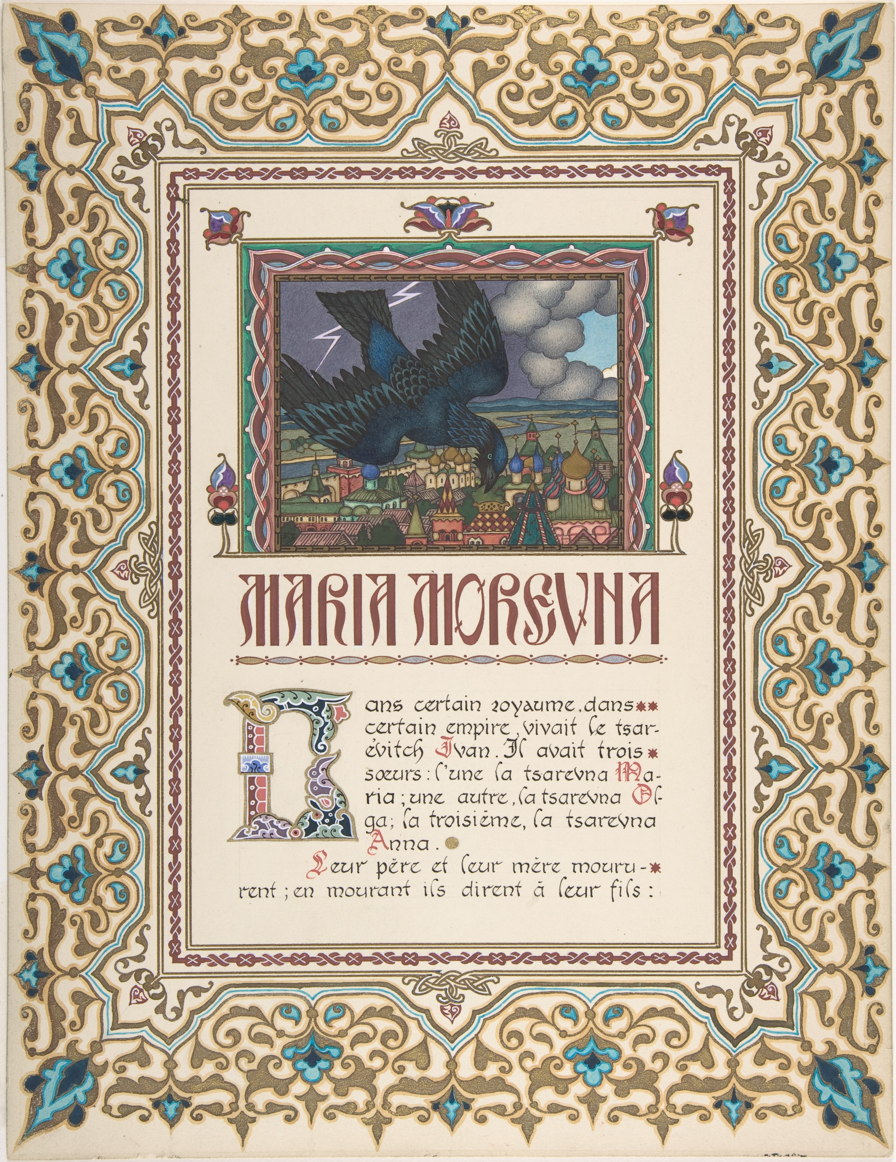 Drawing; Drawings